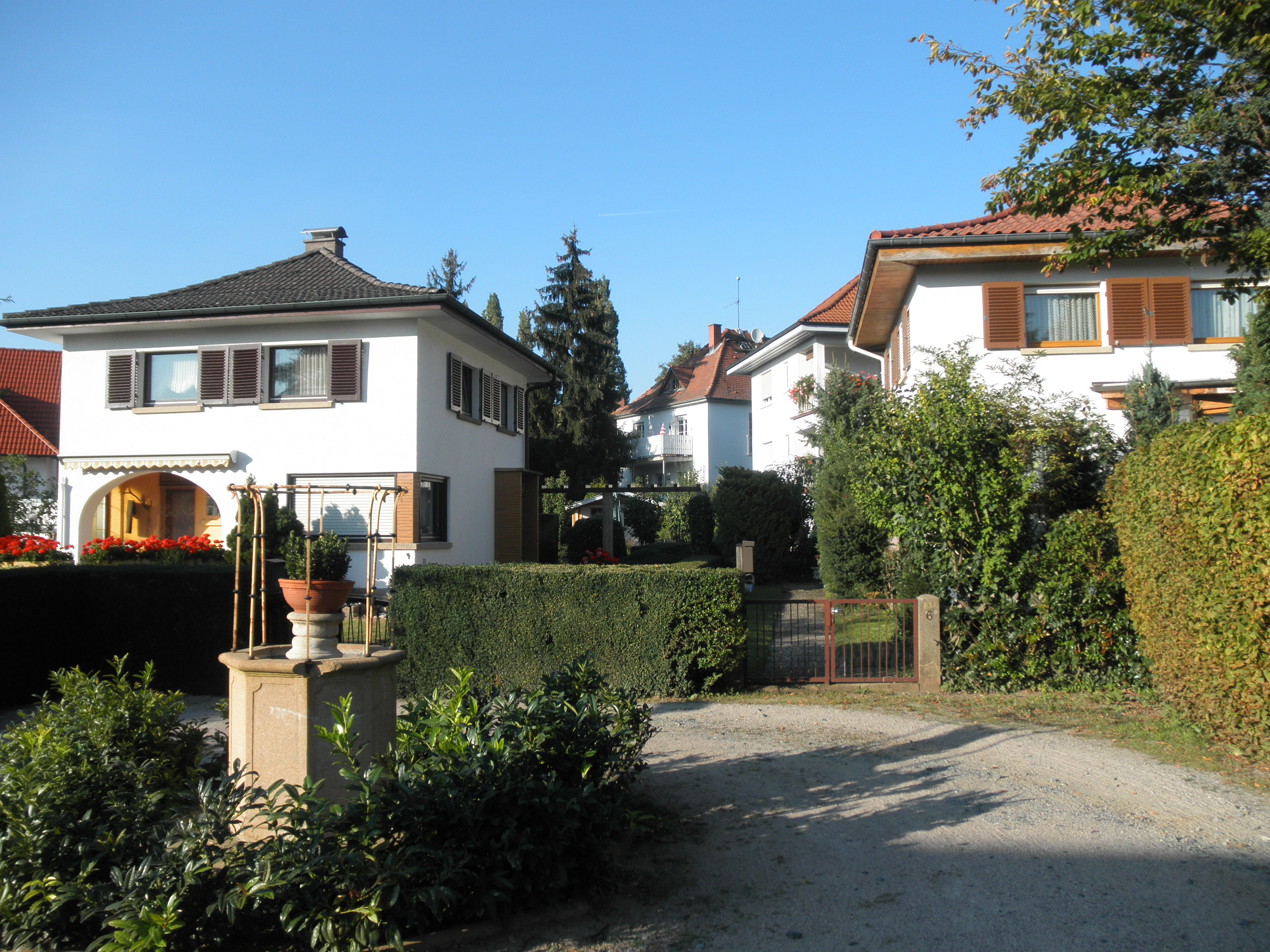 Zwingenberg: Arthur-Sauer-Anlage domoj 4 (maldekstre) kaj 6 (monumenta n-ro 12)